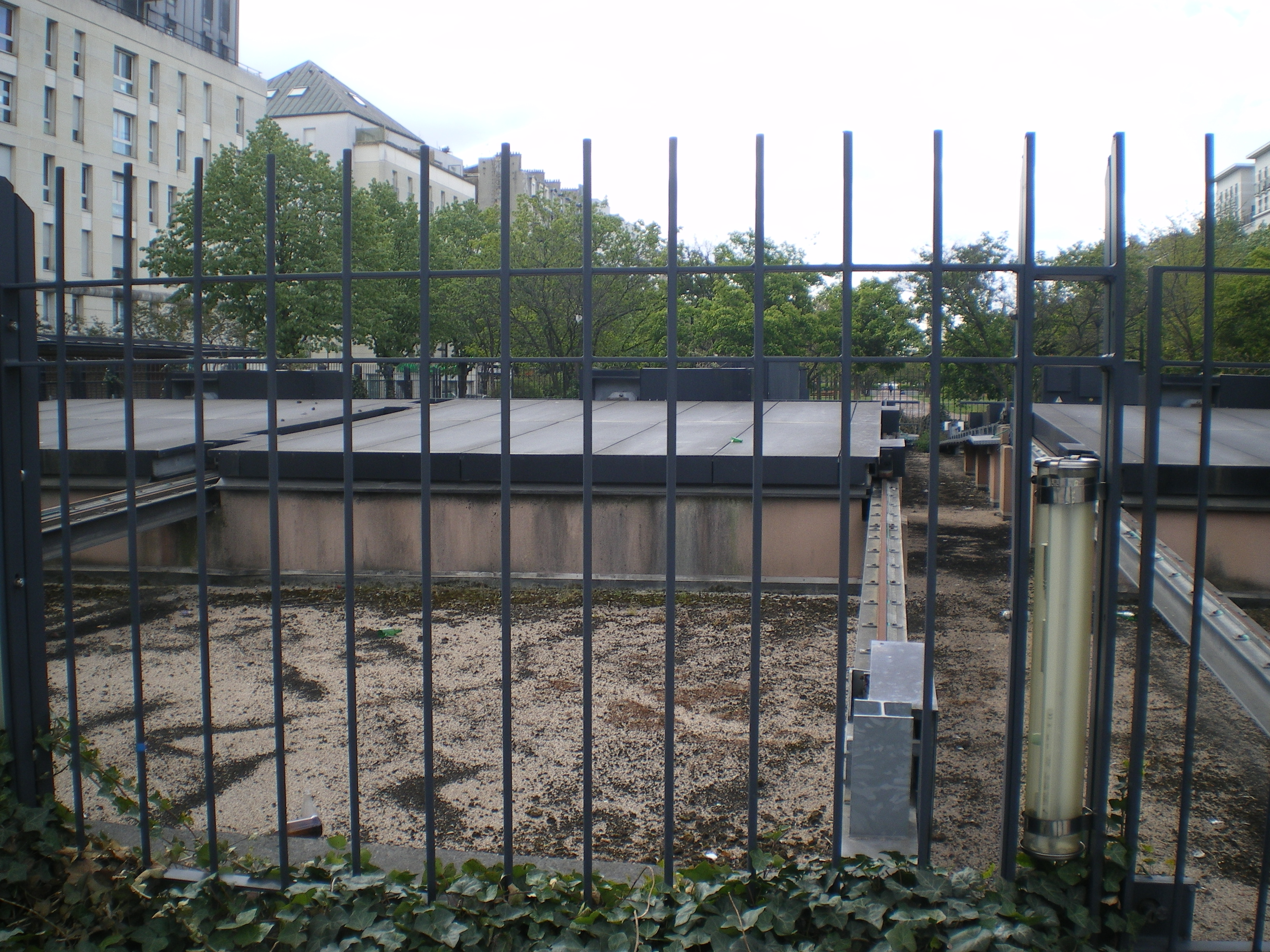 Trappes mobiles de desenfumage du tunnel du Landy.